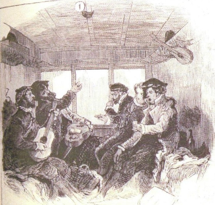 L'Estudiantina Espagnola en route pour Paris où elle va triompher le Mardi Gras 5 mars 1878.